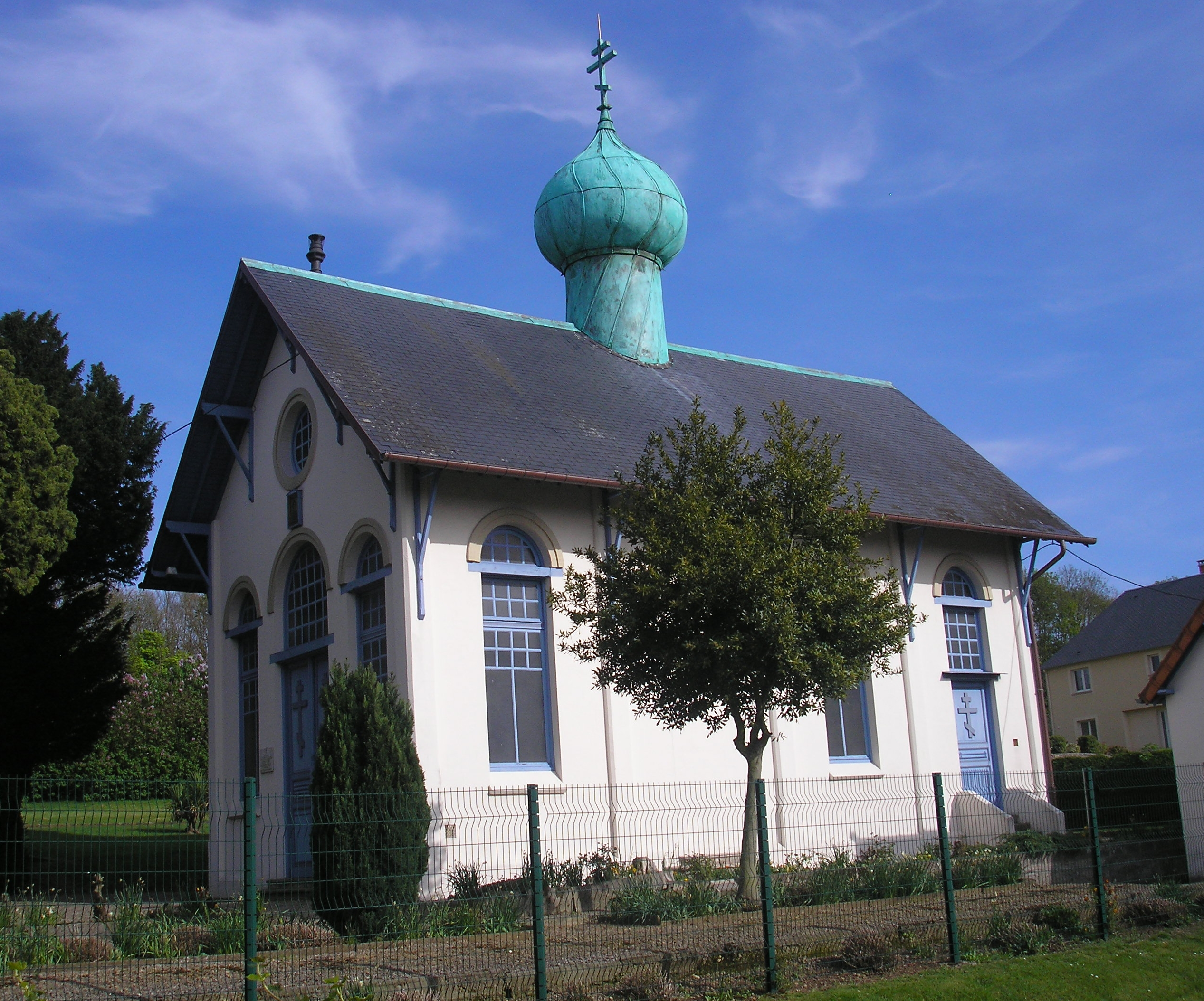 Église orthodoxe Saint-Serge de Colombelles (Calvados, France), inscrite à l'inventaire supplémentaire des monuments historiques (ISMH, 23/ 06/1992).